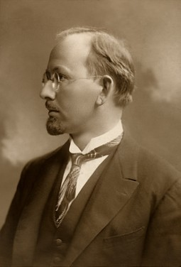 Vladimír Helfert (1886 - 1945), Český muzikolog a dirigent.